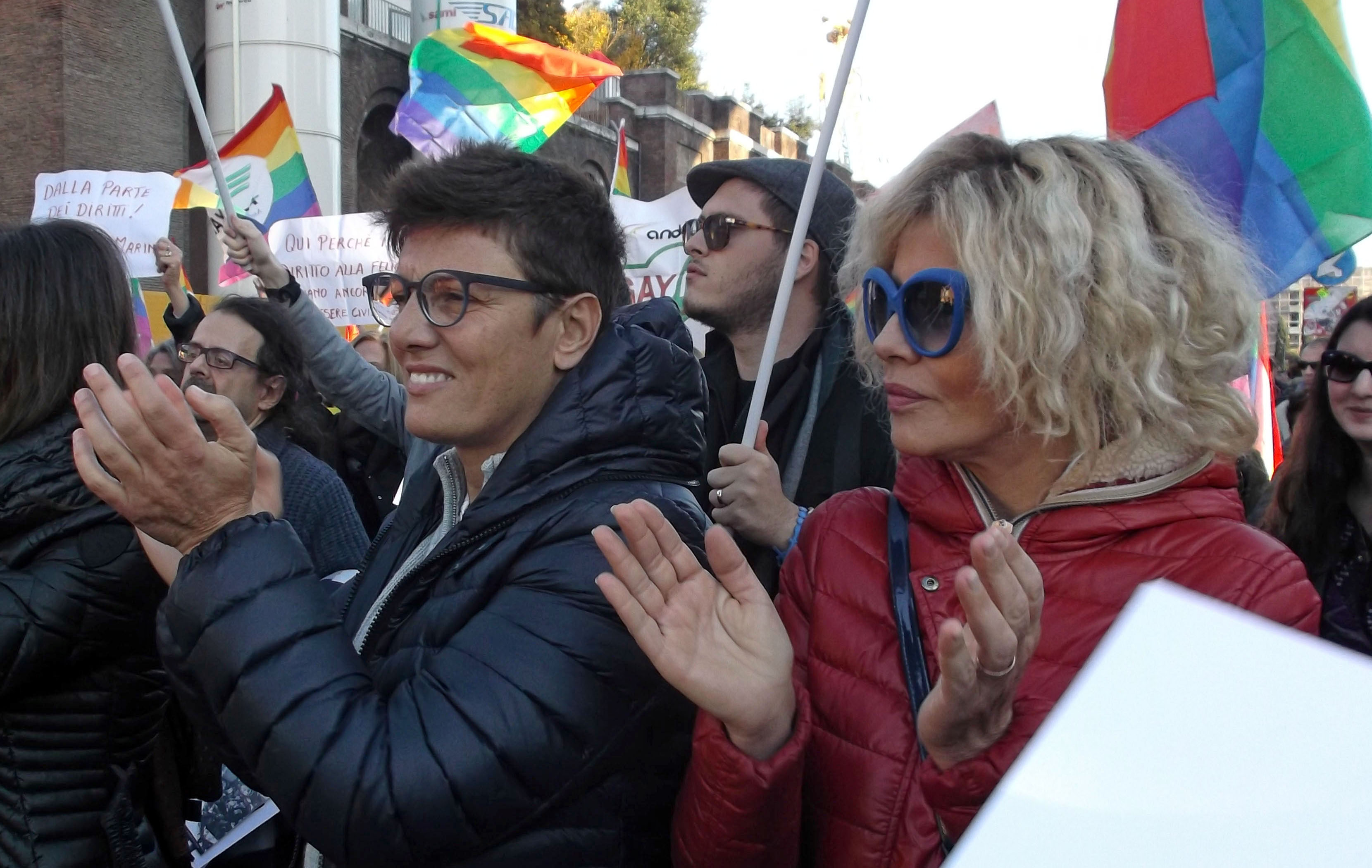 Manifestazione LGBT "Marcia dei diritti" per il matrimonio egualitario in Italia: l'attivista e politica Imma Battaglia (a sinistra) e l'attrice Eva Grimaldi (a destra).